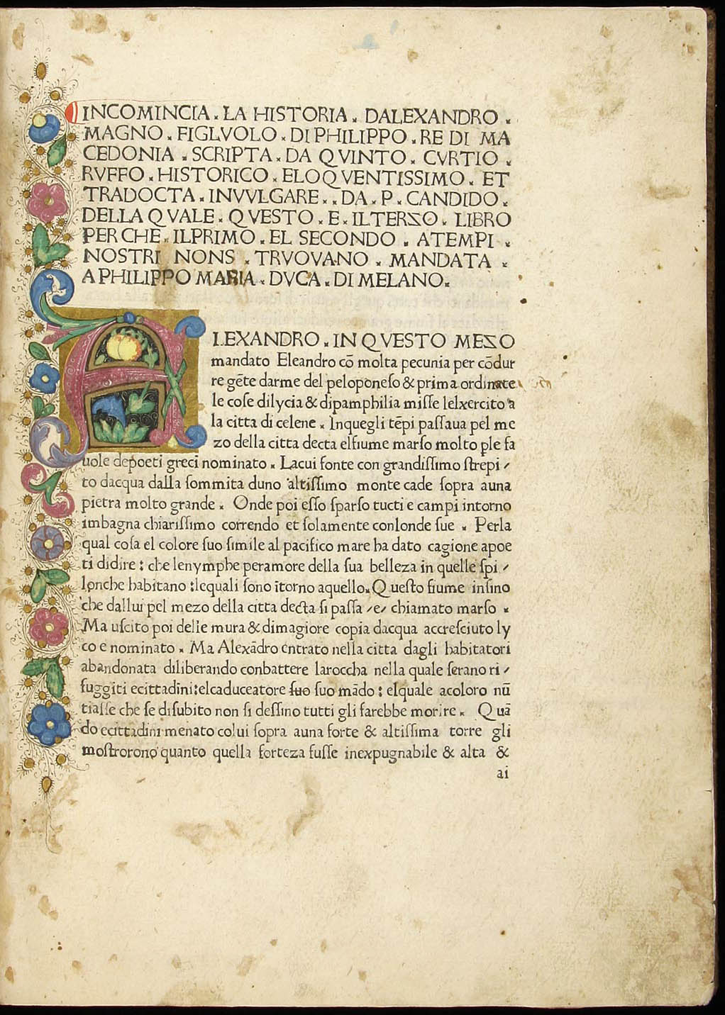 Inkunabel einer italienischen Übersetzung der Historiae Alexandri Magni Macedonis des Quintus Curtius Rufus, Florenz 1478